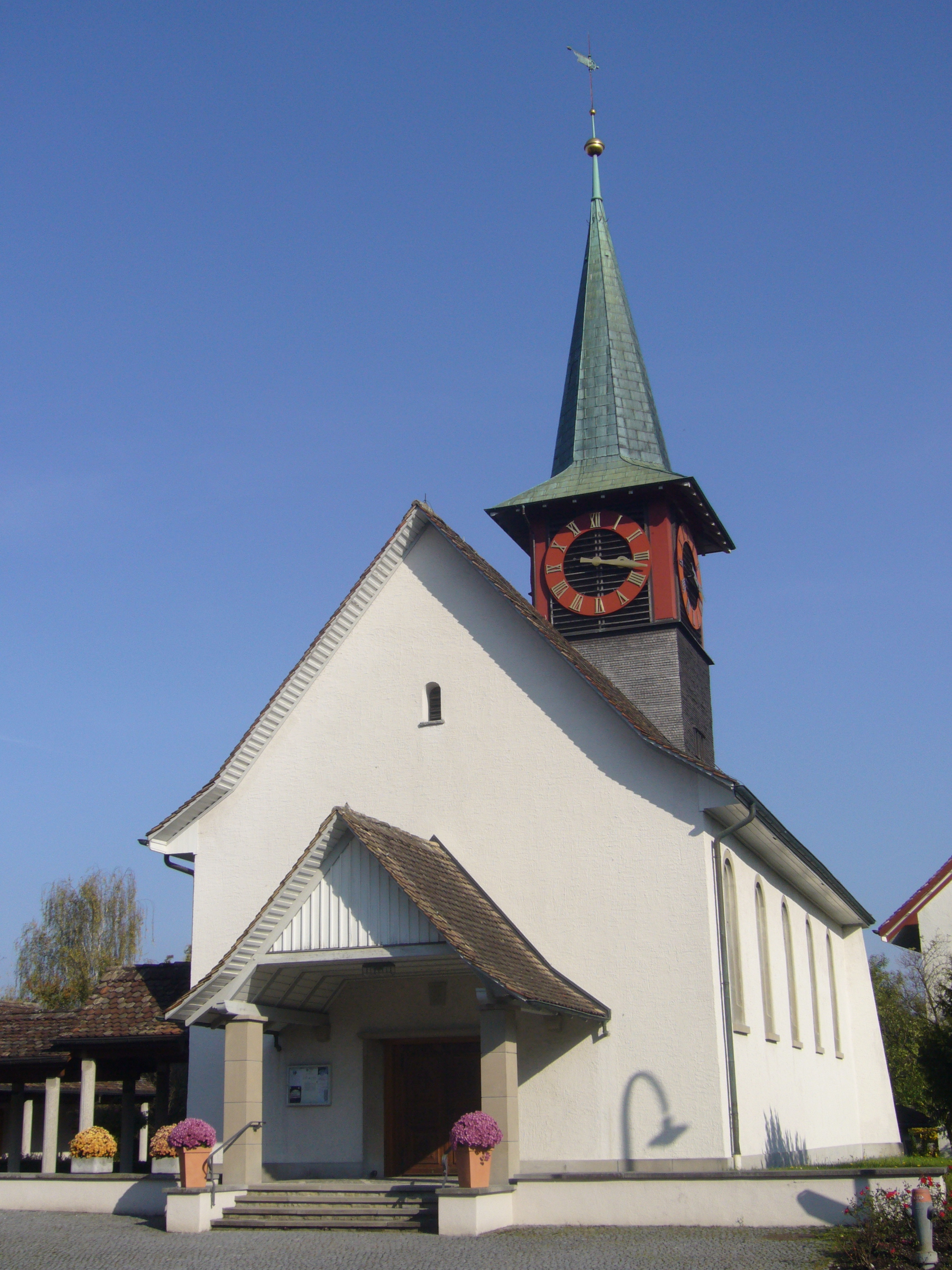 Reformirte Kirche Dietlikon.